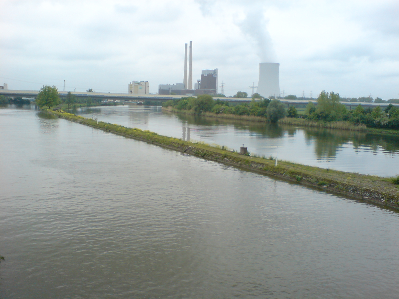 Neckarkanal (links) und gestauter Neckar (rechts) in Neckarsulm, im Hintergrund das Heilbronner Kohlekraftwerk.